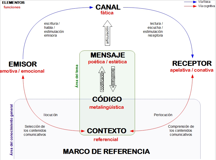 un modelo de comunicación